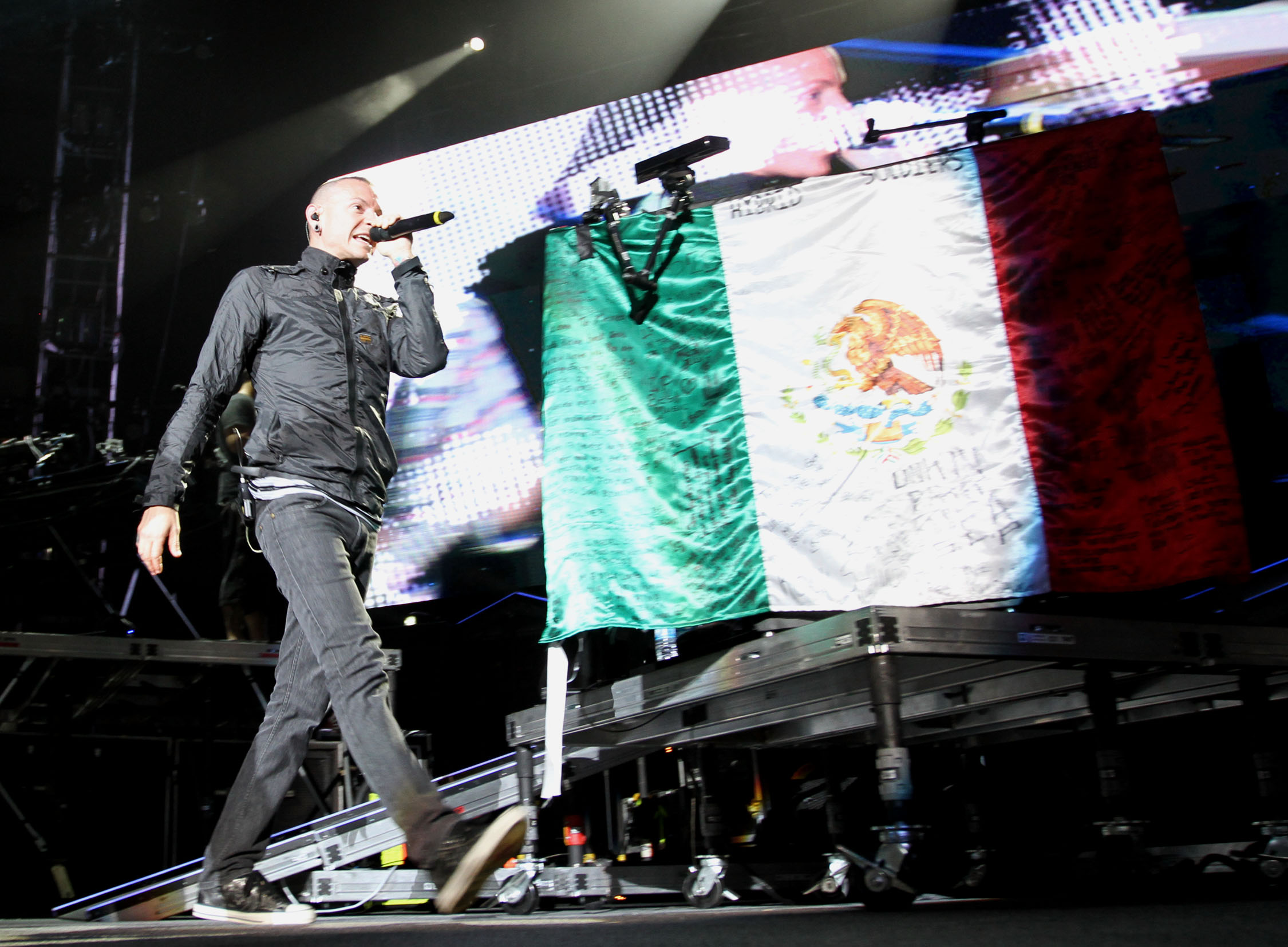 Concierto de la banda estadounidense Linkin Park en la Arena Ciudad de México de su gira Living Things